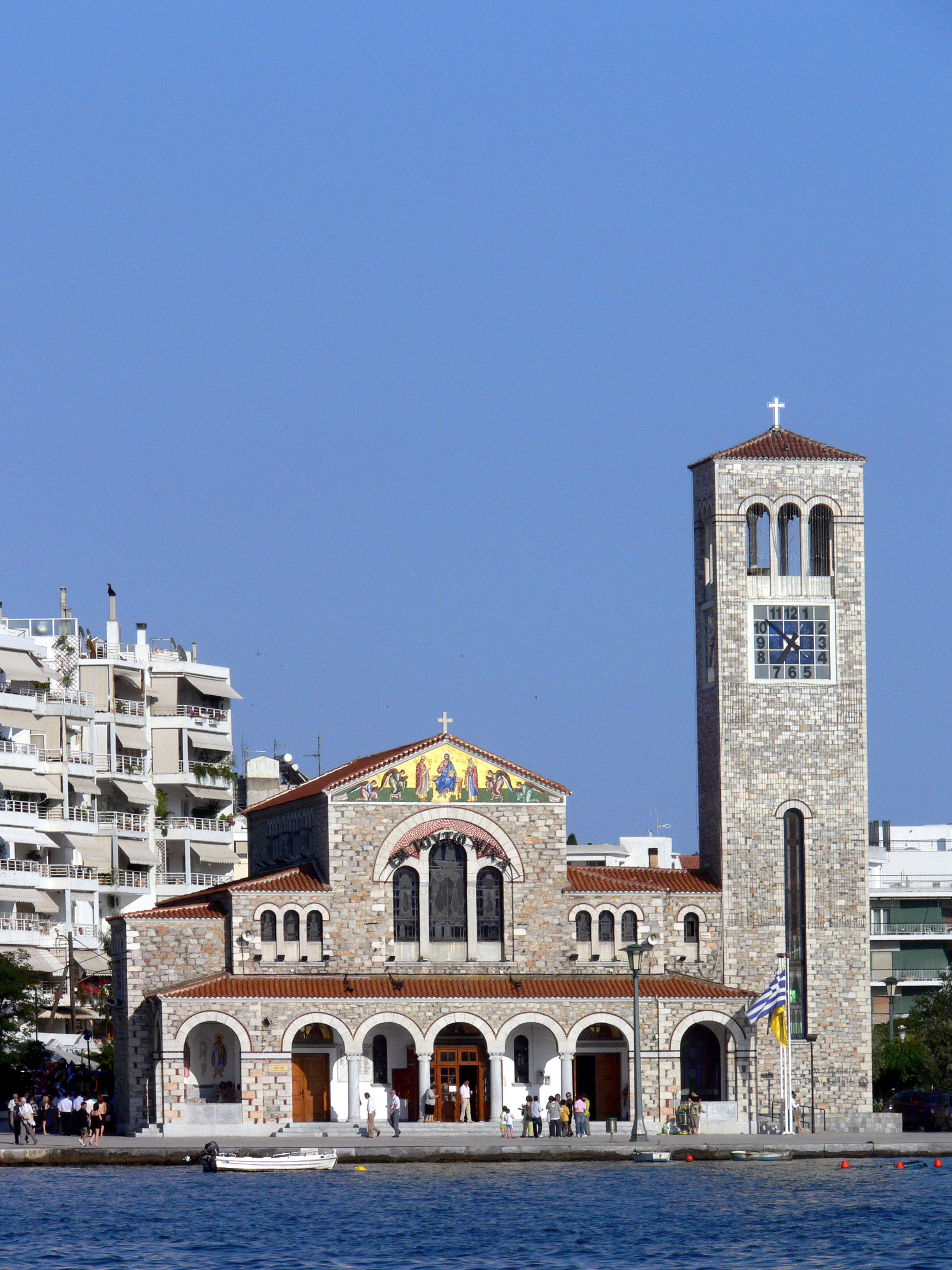 Volos. Basilika